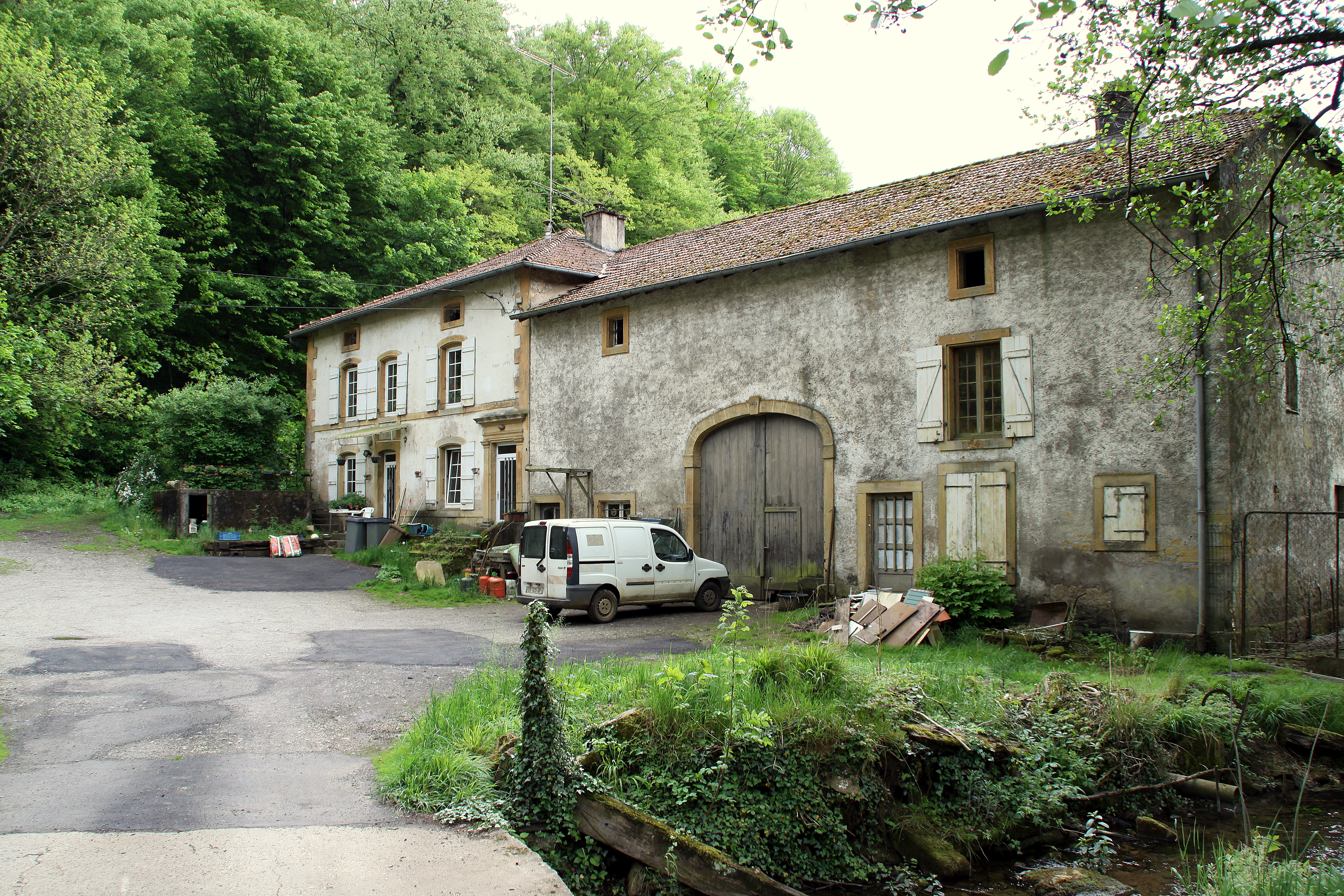 De Moulin de Pérotin um Conroy an der Gemeng Neufchef